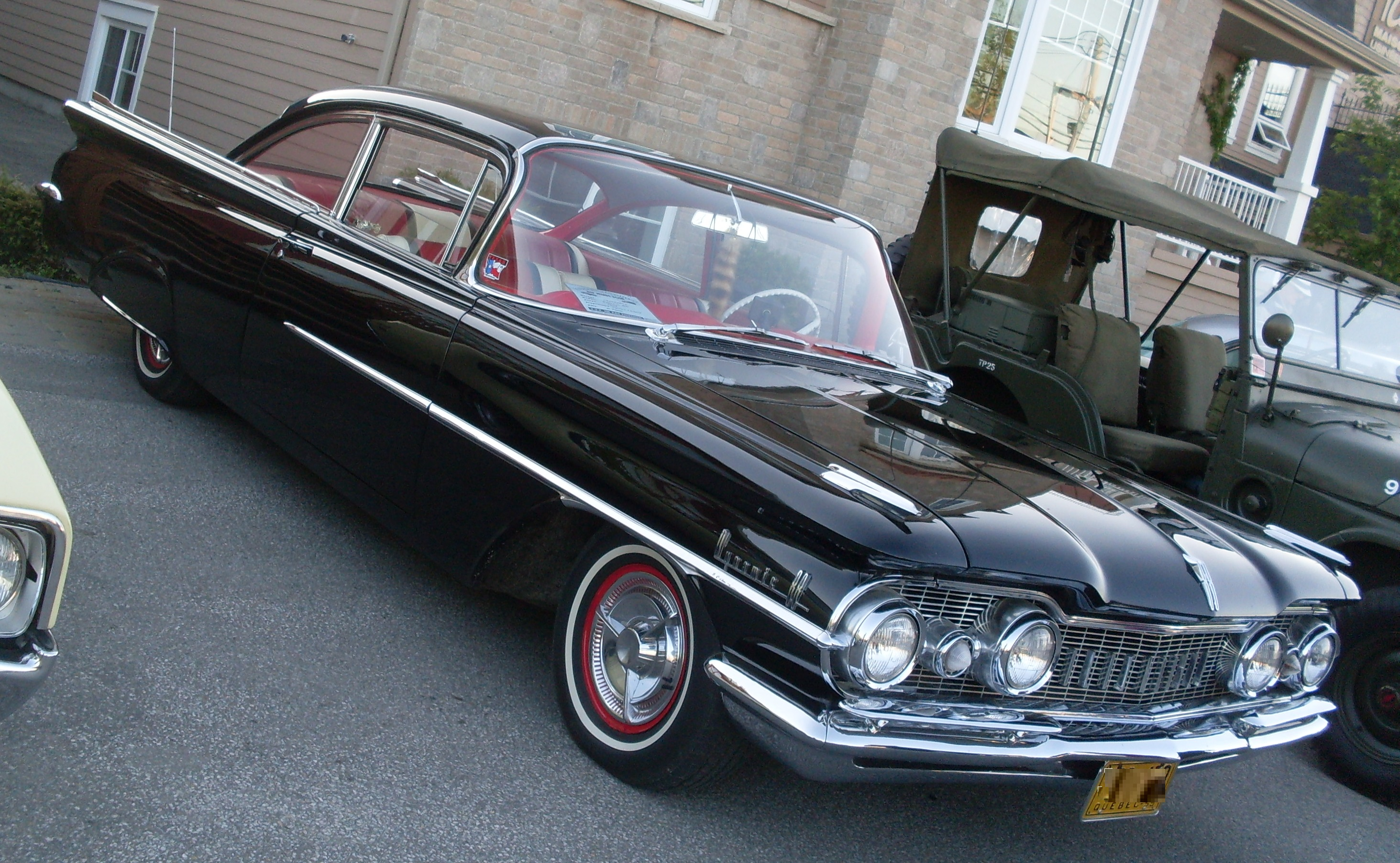 1959 Oldsmobile Dynamic 88 photographed in St. Lin/Laurentides, Quebec, Canada at Auto classique St-Lin/Laurentides.